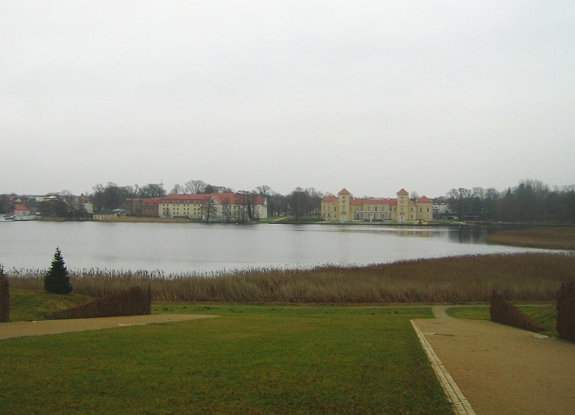 Blick über den Grienericksee auf Schloss Rheinsberg